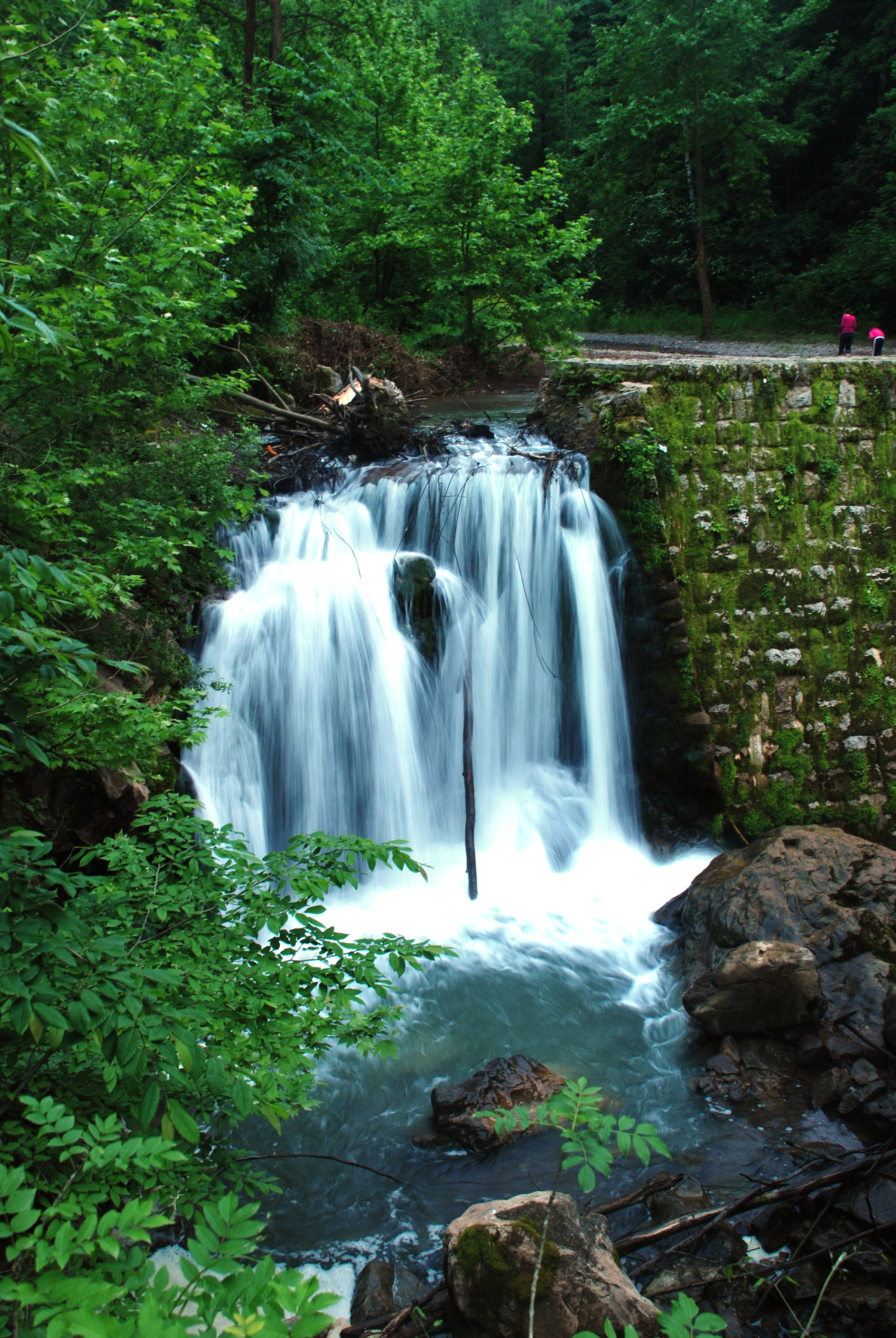 Sakarya, Kocaali, Maden Deresi şelalesi